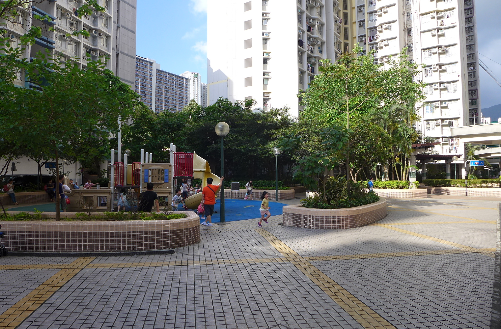 Upper Wong Tai Sin Estate Garden view